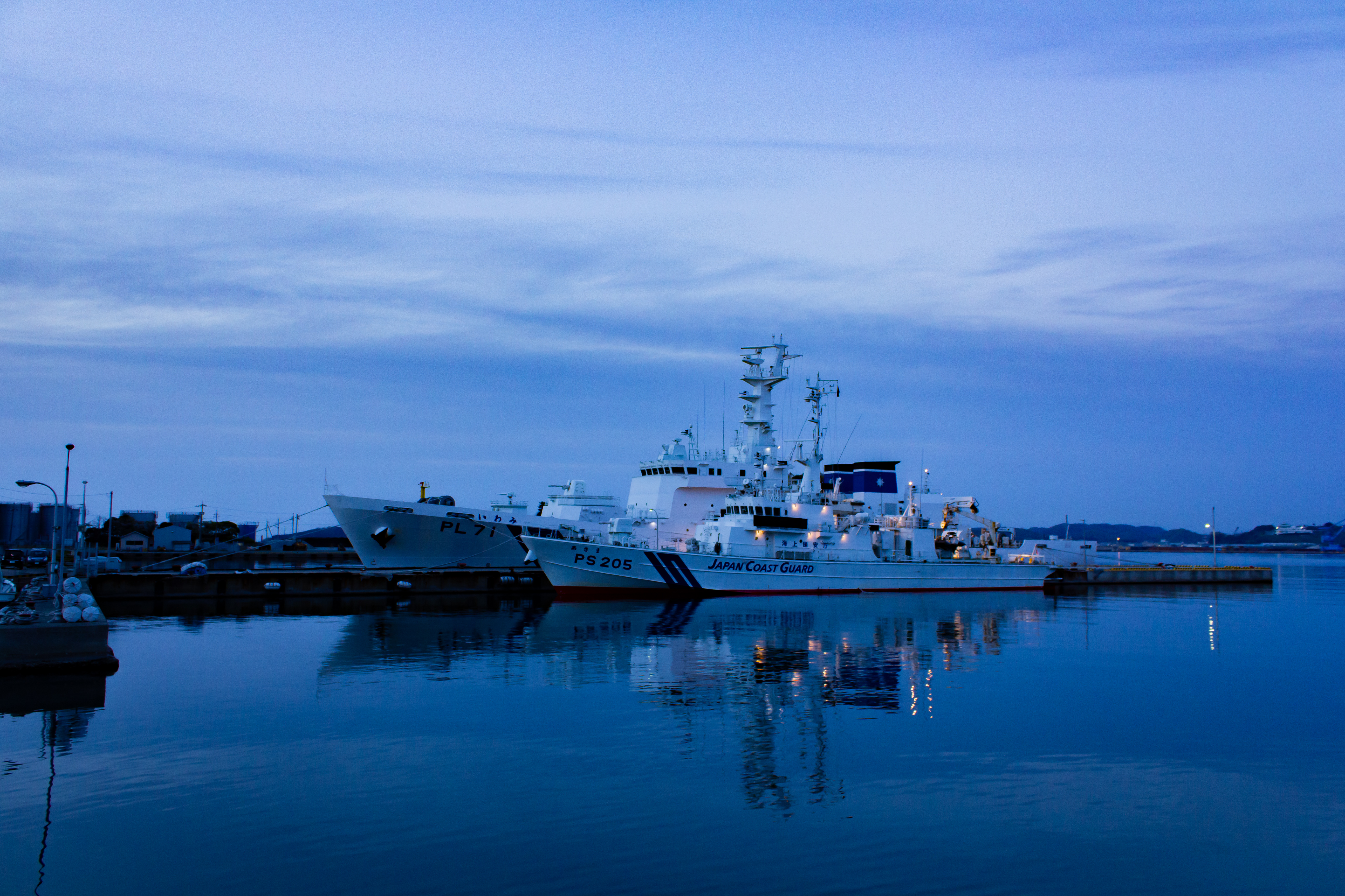 海上保安庁所属PS205「あさま」、PL71「いわみ」